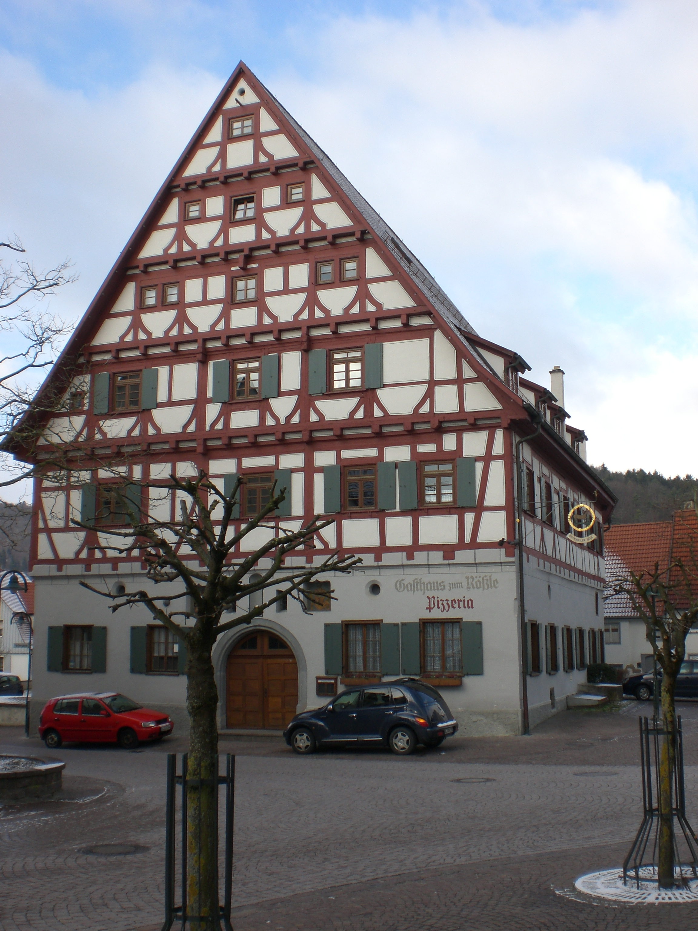 Das „Rößle“, Gasthaus zum Rößle, Schelklingen, Deutschland, ehemals Wohnhaus des Hanß Reuß von Reußenstein (erbaut in der 2. Hälfte des 16. Jahrhunderts.)